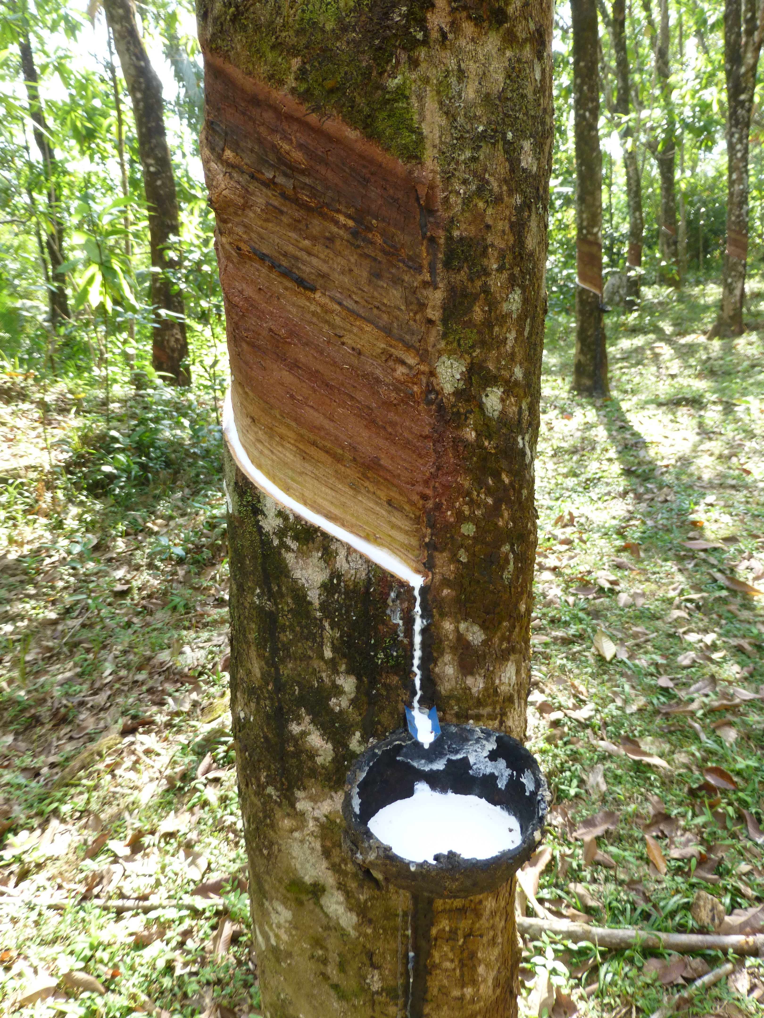 Plantation d'hévéa au Sri Lanka (Province du Sud)